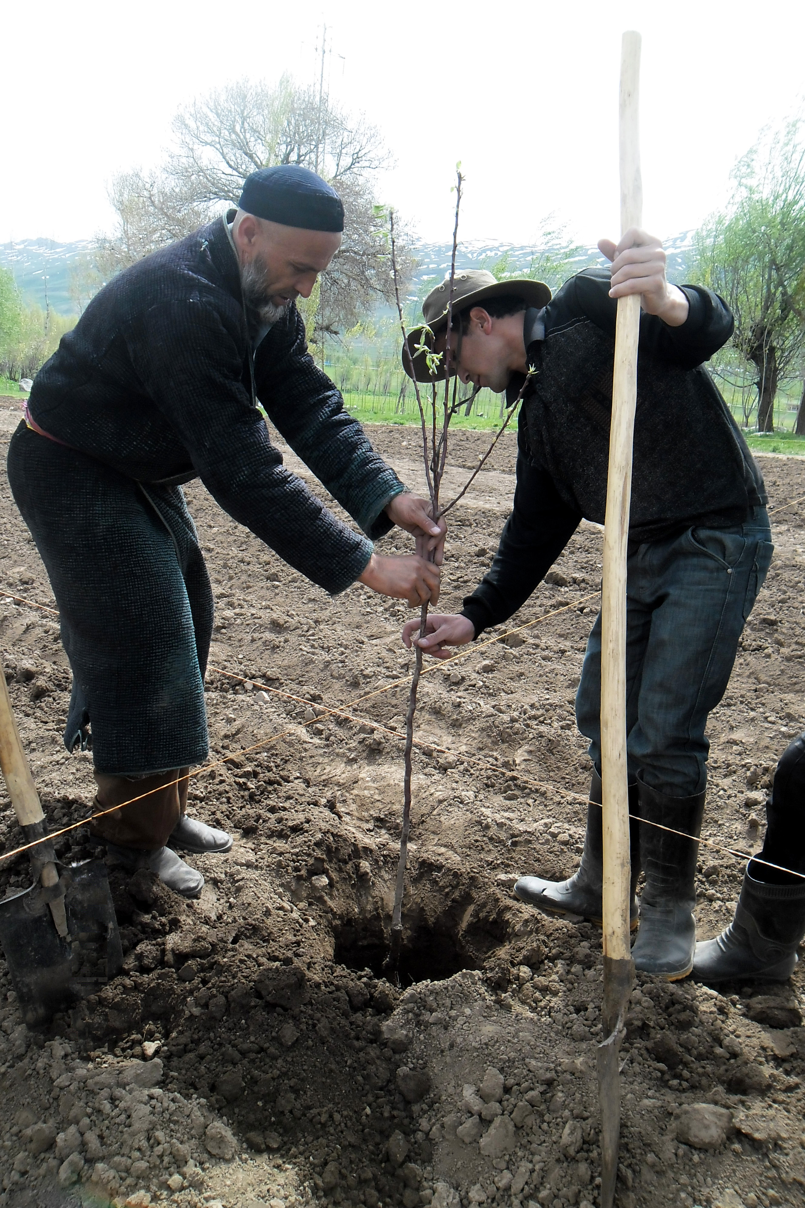 Тоҷикӣ: Бунёди боғи нави себ ва нок дар деҳаи Элоки ноҳияи Файзобод